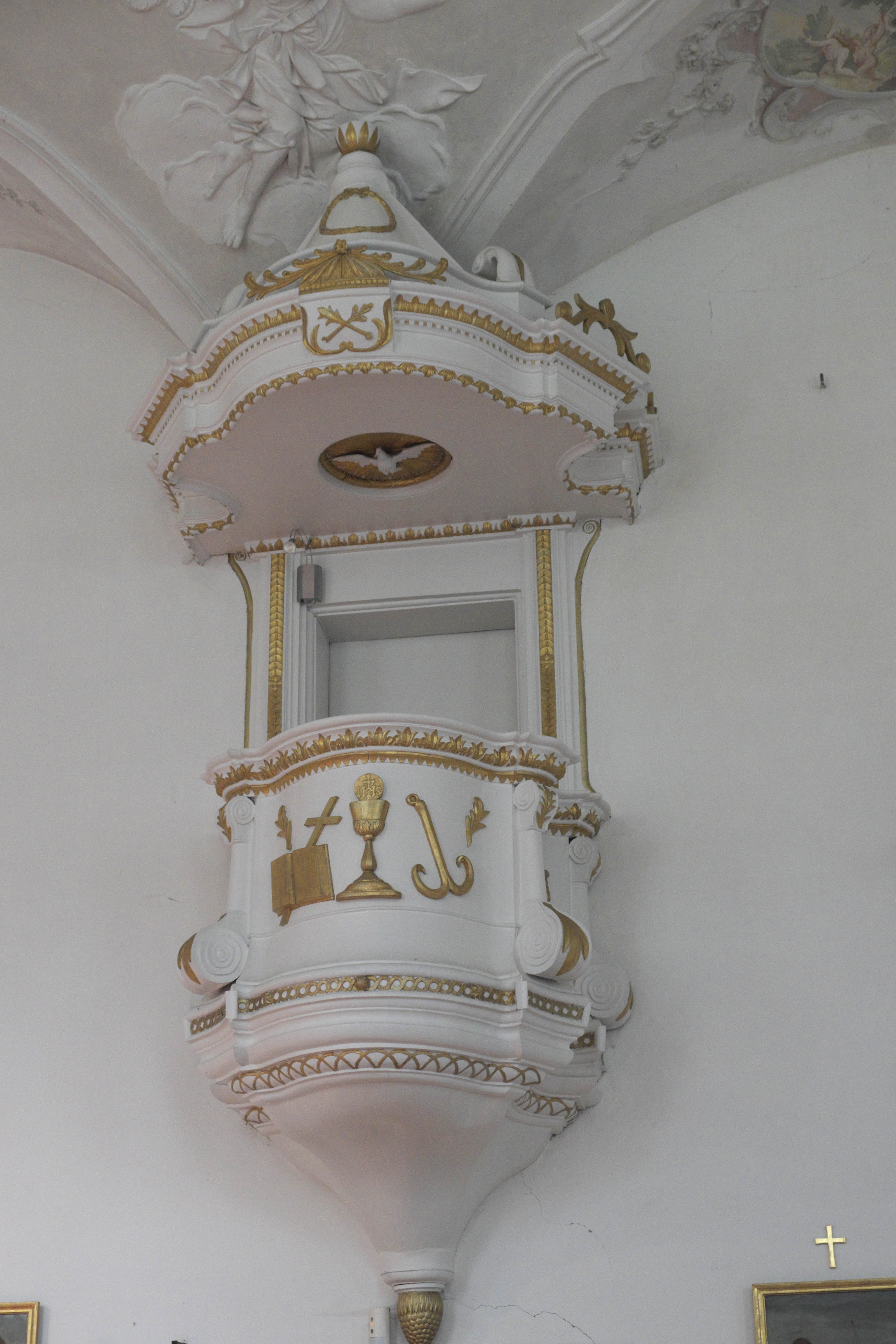 Ehemaliges Deutschordensschloss, Schloss Blumenthal, in Klingen, einem Stadtteil von Aichach im Landkreis Aichach-Friedberg (Bayern), ehemalige Schlosskapelle, katholische Filialkirche St. Maria, neoklassizistische Kanzel, um 1770/80